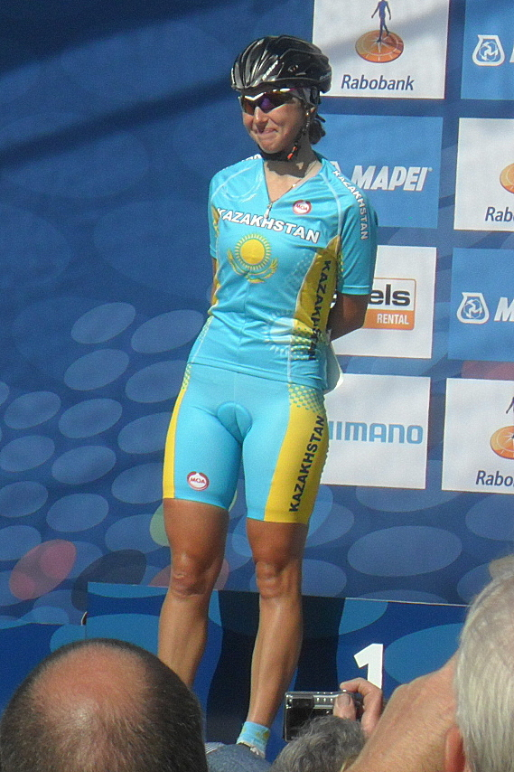 Rimma Luchshenko (Kazachstan) voor de start van het Wereldkampioenschap 2012 in Valkenburg, Nederland.